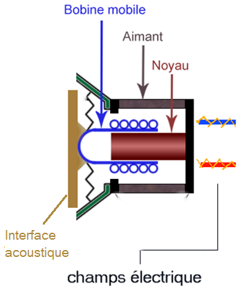 Cet hydrophone est constitué d’une membrane et d’un aimant autour duquel s’enroule un circuit électrique. Du fait de l’action mécanique exercée par l’onde sonore sur la membrane, celle-ci entre en vibration. Cette vibration entraine une force électromotrice et donc un champ magnétique variable. Ce champ magnétique variable induit un courant i variable dans le circuit électrique.